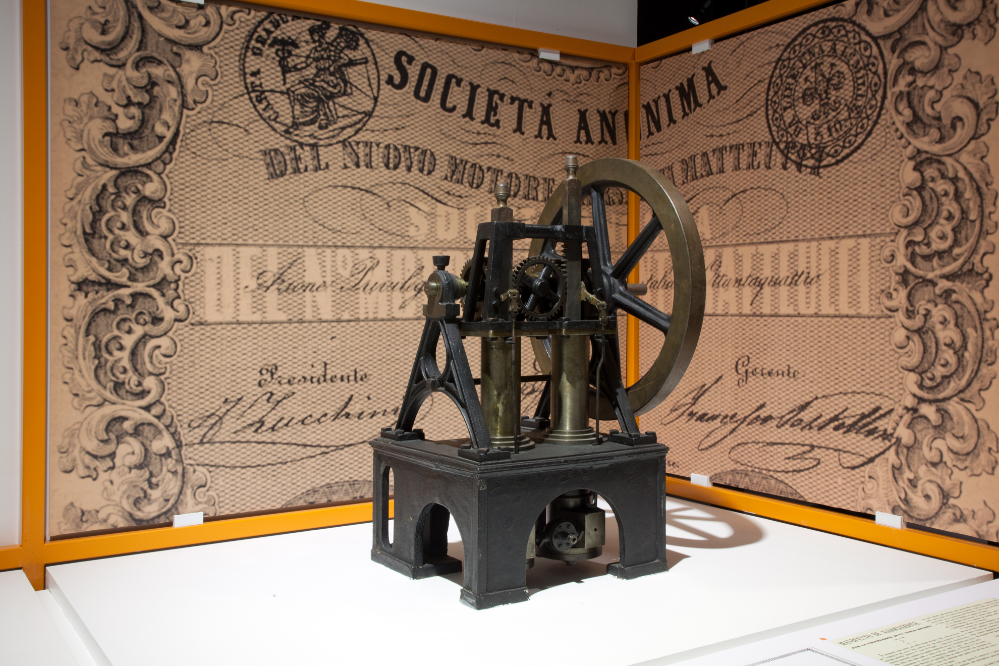 Motore a scoppio Barsanti e Matteucci, 1854, riproduzione ante 1962. Esposto al Museo nazionale della scienza e della tecnologia Leonardo da Vinci, Milano. Il modello riproduce il primo esempio di motore a combustione interna usato per azionare macchine utensili. Fu impiegato per la prima volta nel 1856 nelle Officine della Stazione ferroviaria Maria Antonia di Firenze su una forbice e un trapano.